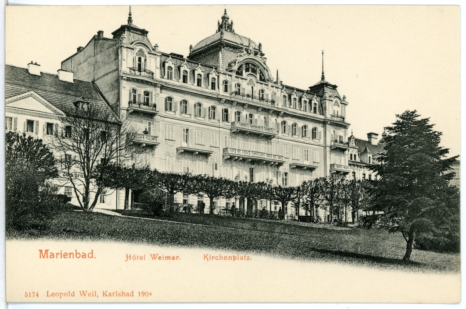 Marienbad; Kirchenplatz und Hotel Weimar This postcard is from publisher Brück & Sohn in Meißen ( This postcard has a unique number 05174 and is available in a higher resolution at the publisher. This images was uploaded in a cooperation project between Wikipedians and the publisher.